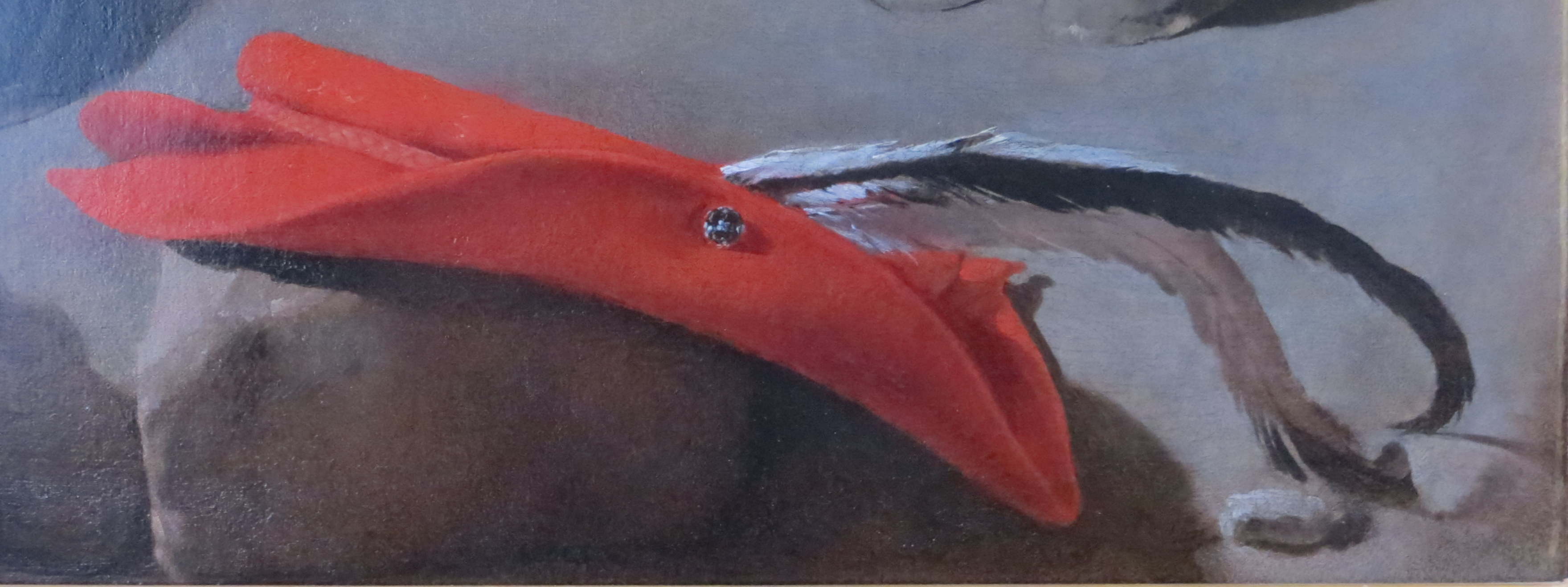 Georges de La Tour Le Vielleur détail du chapeau